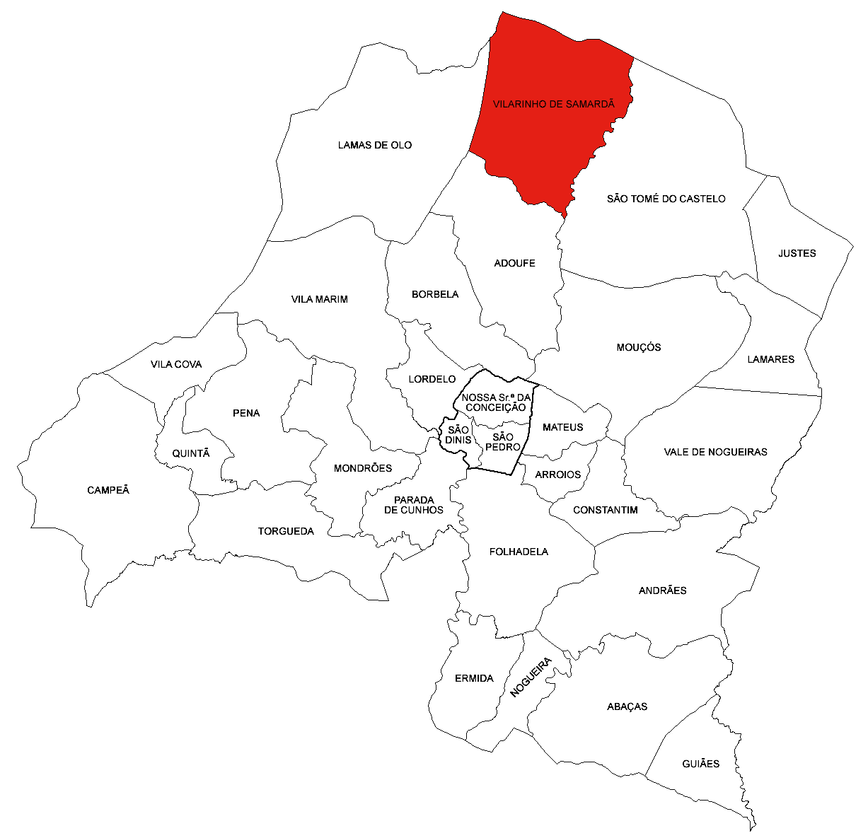 Freguesia de Vilarinho de Samardã (concelho de Vila Real)